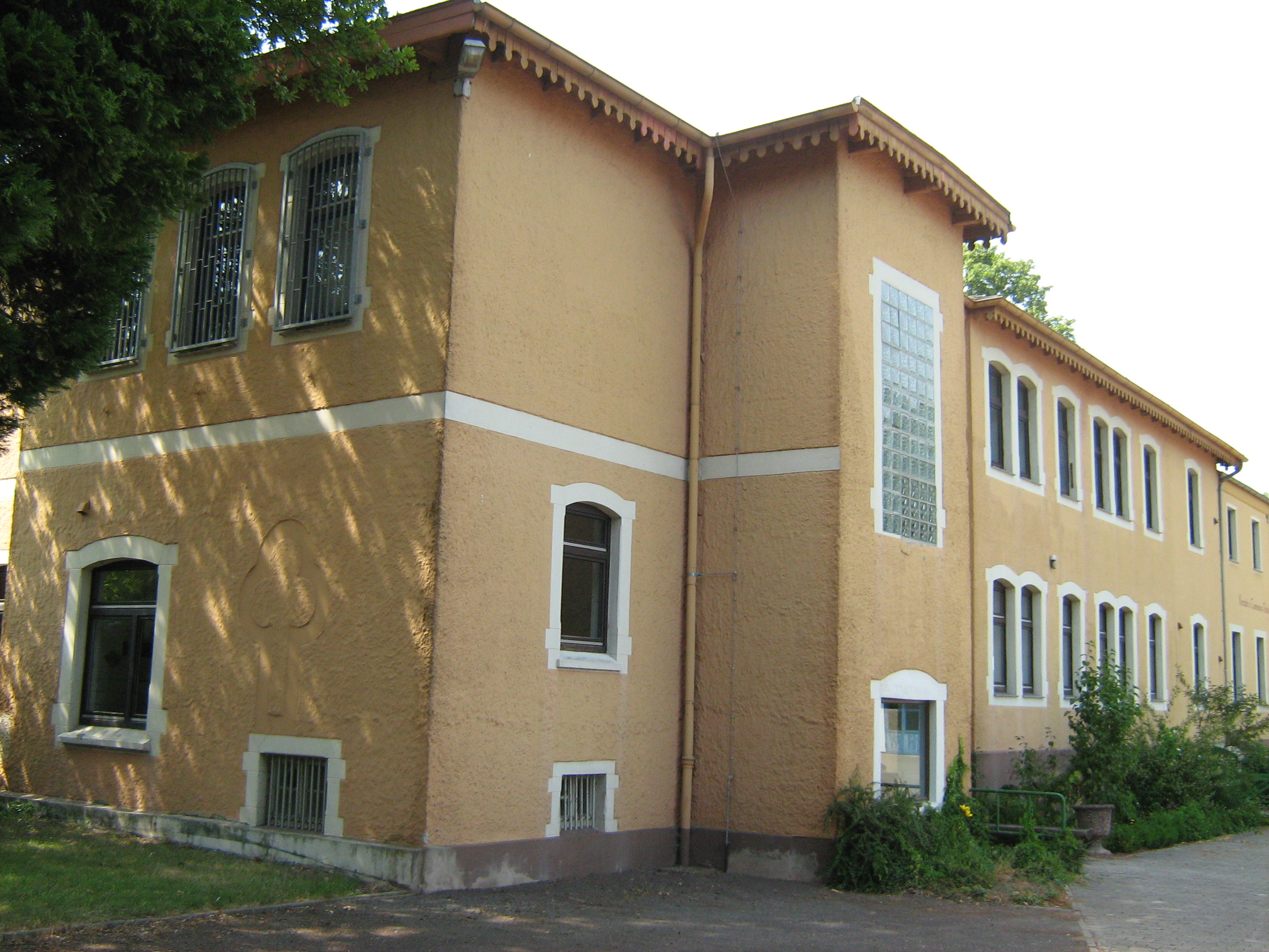 Freistatt Jugend-Anstaltsgebäude im Jahr 2010 (heute Schule)